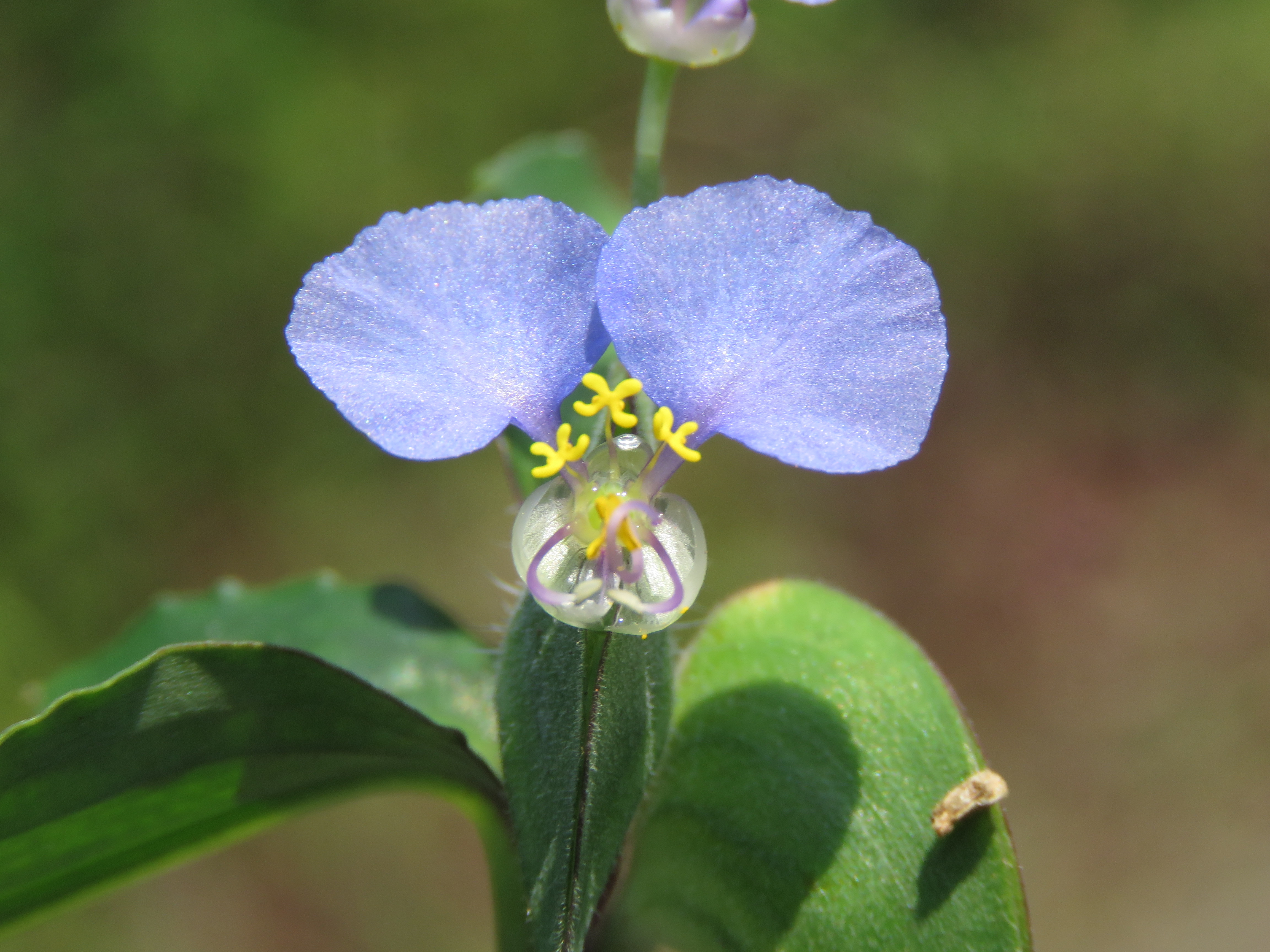 Photos by Vinayaraj